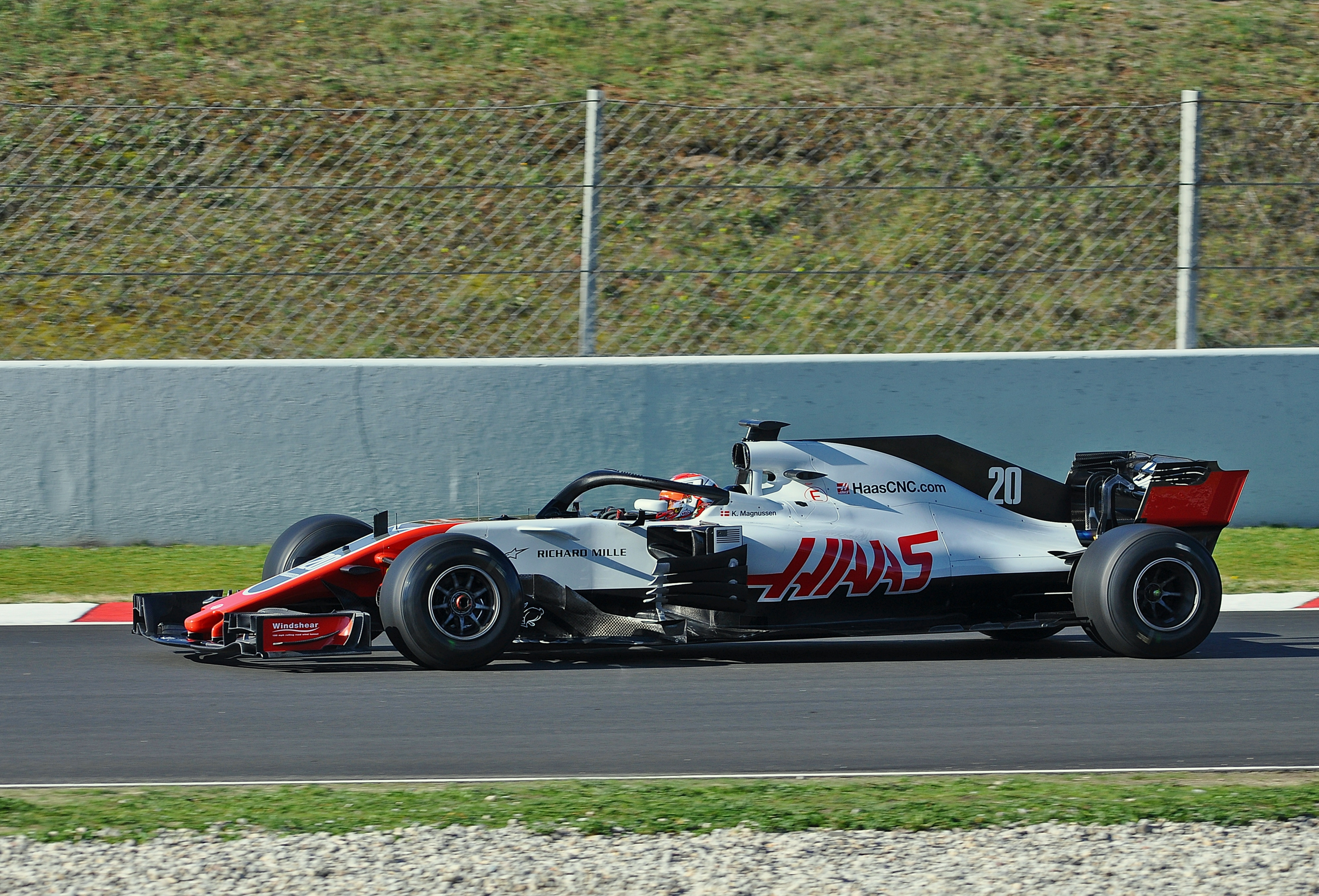 Haas VF-18